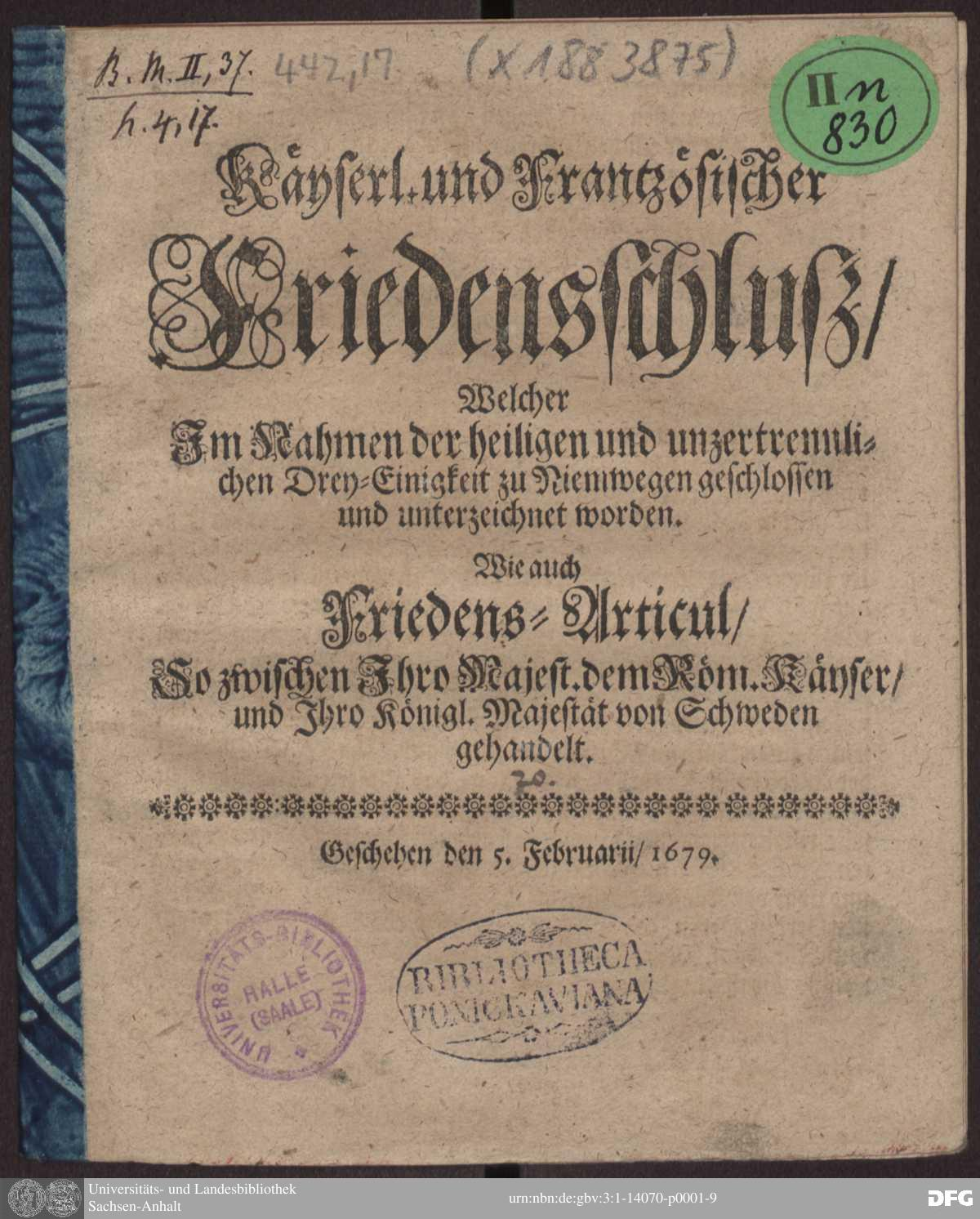 Abdruck des Friedens von Nimwegen 1679